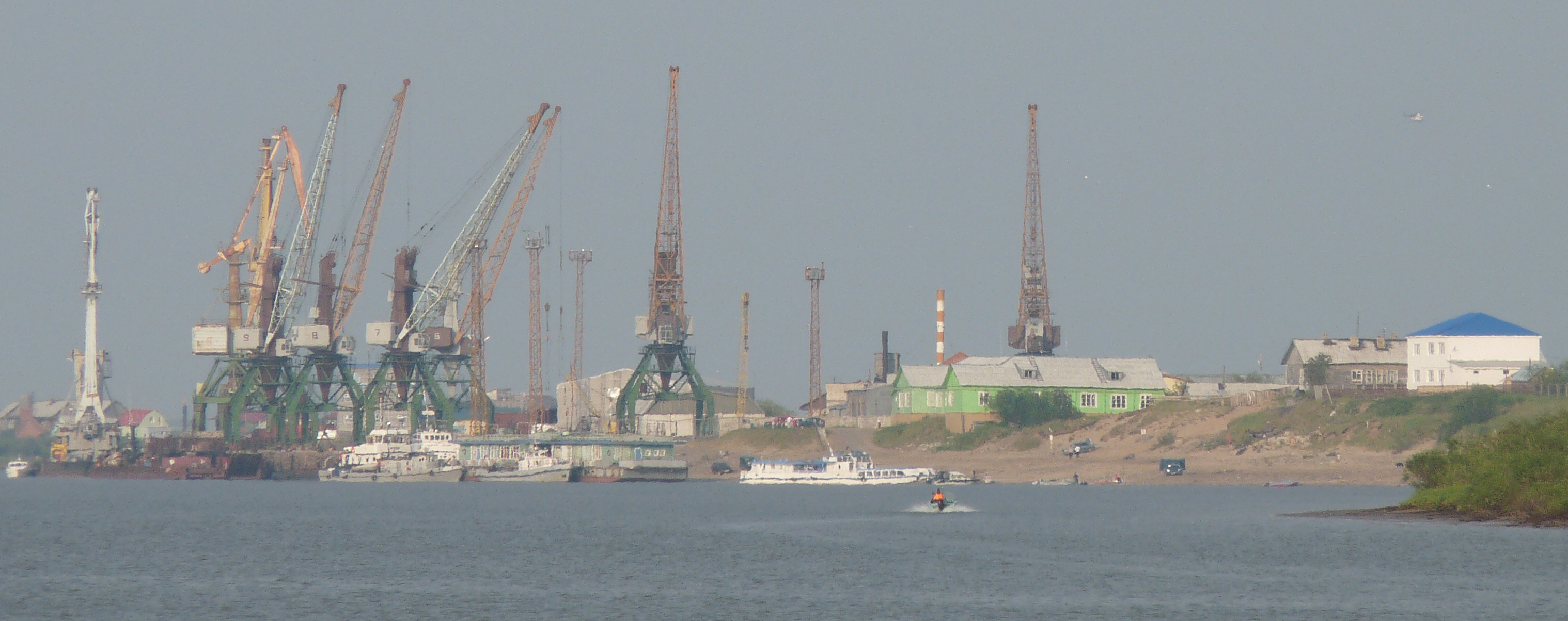 Вид на город с реки Печора(со стороны морского порта)